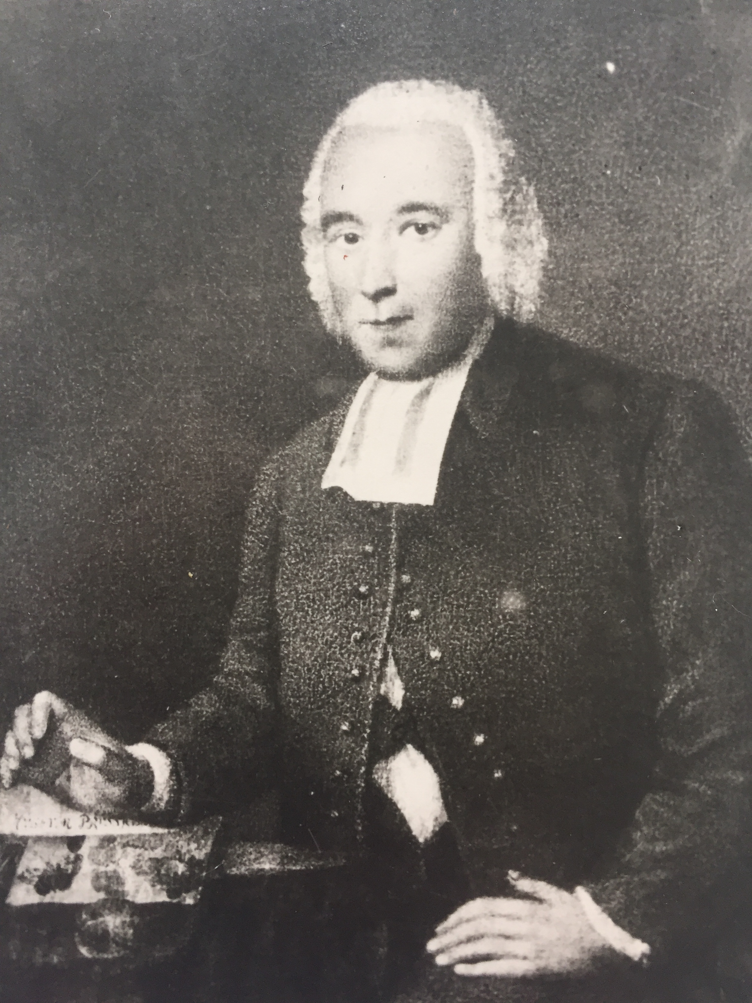 Otto von Batocki